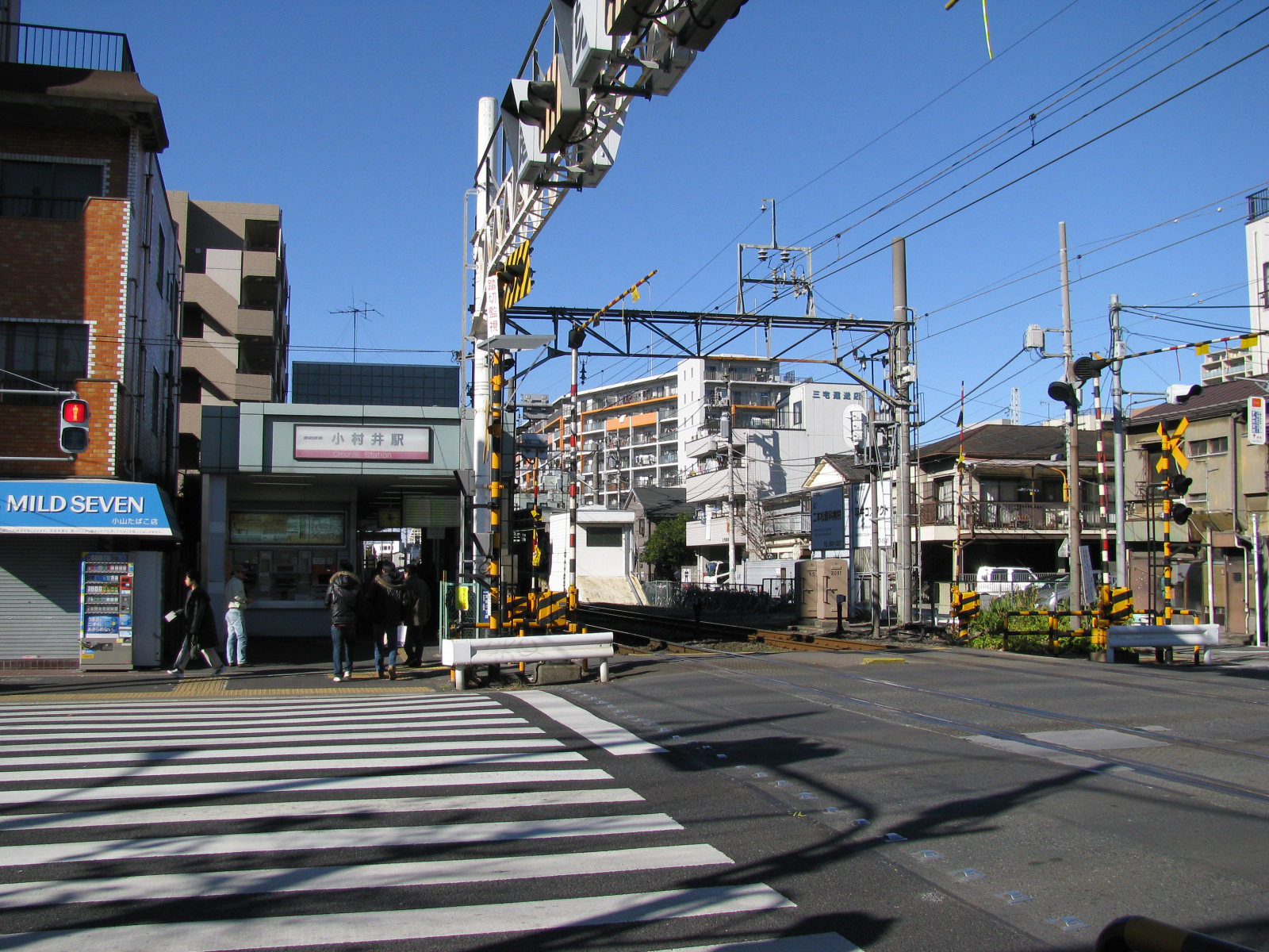 東武亀戸線小村井駅